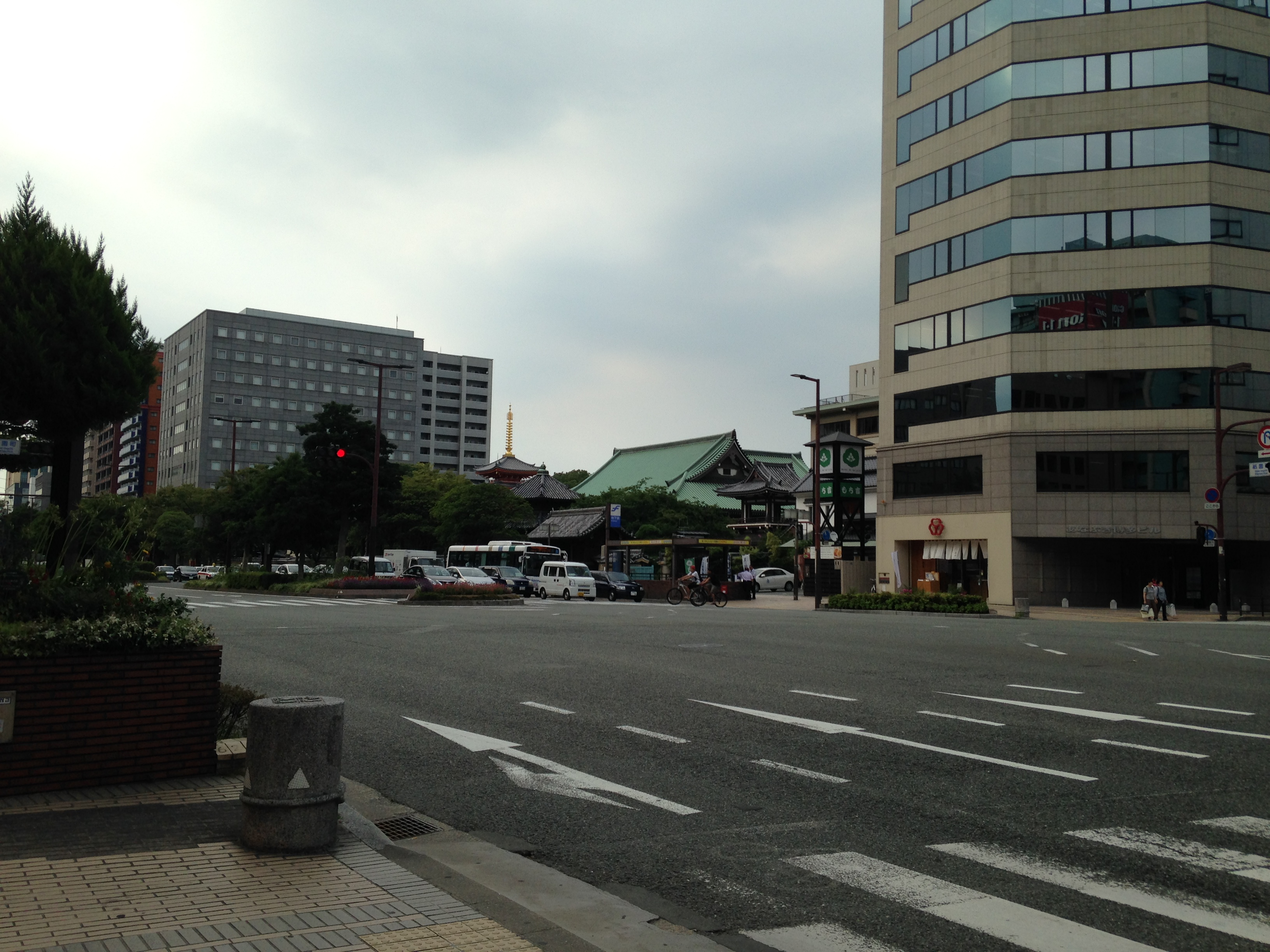 東長寺と大博通りの遠景